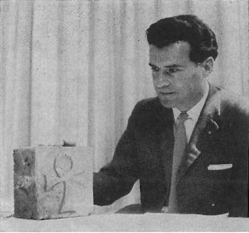 Hans-Erland Heineman med specialtegelsten till Skövde kulturhus